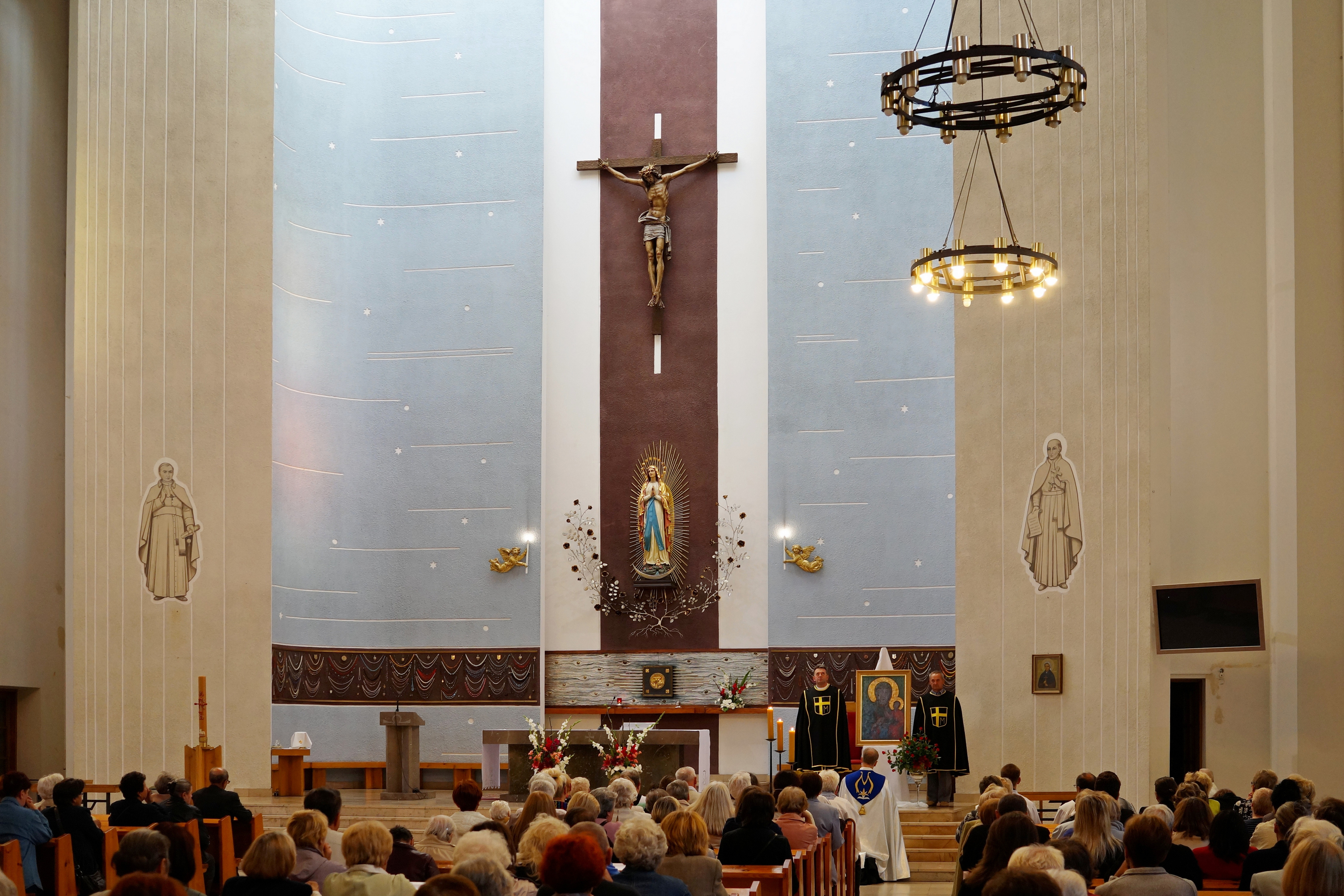 Matki Bożej z Lourdes w Warszawie - peregrynacja kopii obrazu Matki Bożej Częstochowskiej w dniu 3 września 2014.